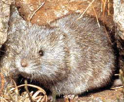 Chionomys nivalis syn. Microtus nivalis